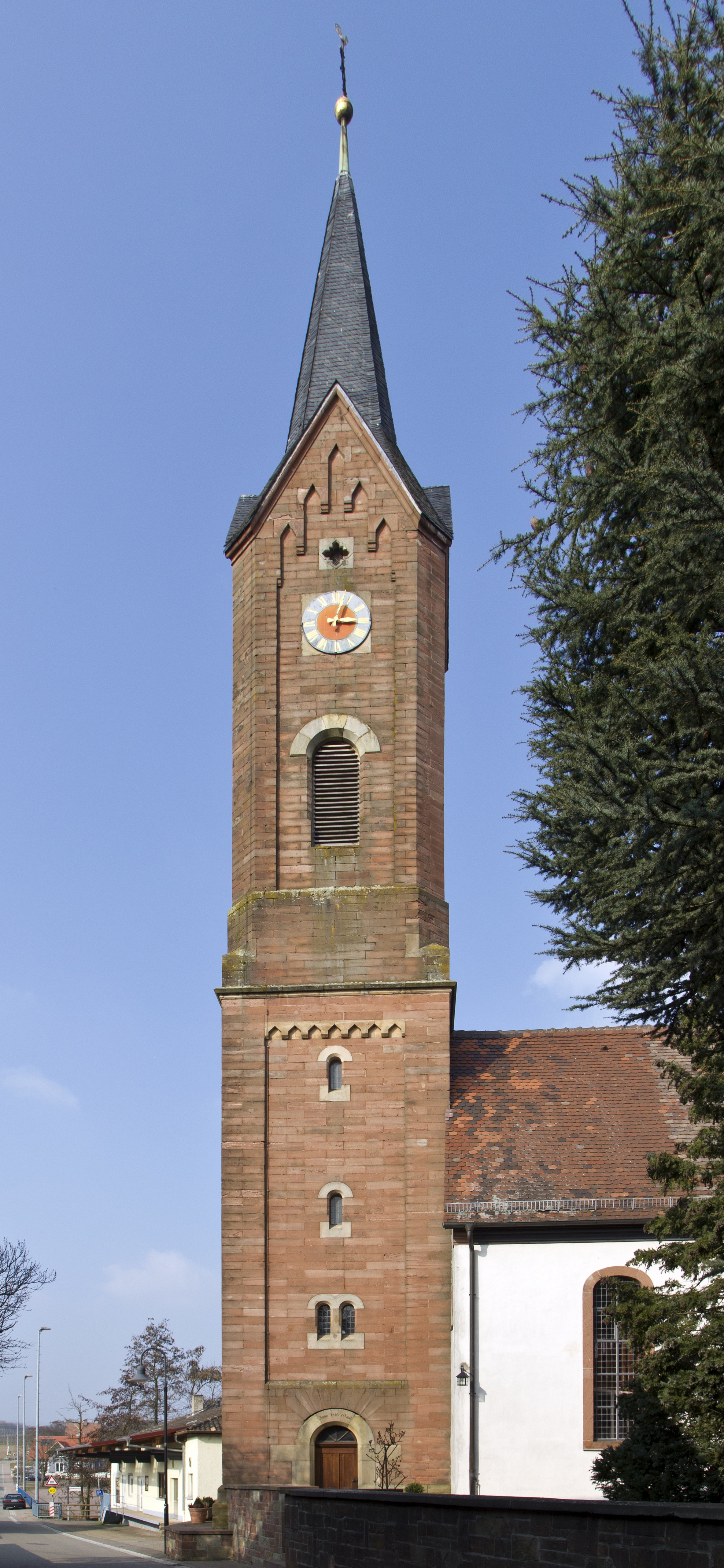 Kapellen-Drusweiler, Protestantische Pfarrkirche, barocker Saalbau, bezeichnet 1717–1719, neuromanischer Turm, bezeichnet 1865, Renovierungen 1664, 1727, 1817, 1961-1964, 1984